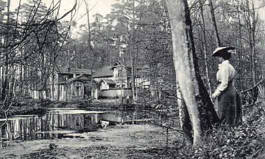 Am Restaurant im Schwärzetal in Eberswalde.